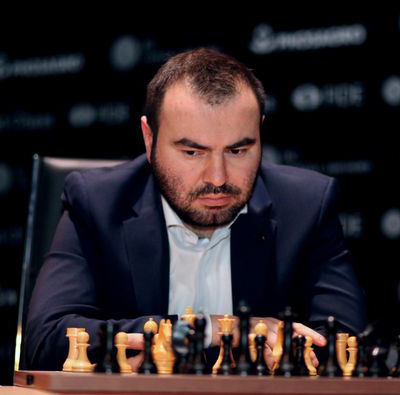 Шахрияр Мамедьяров, Турнир Претендентов 2018